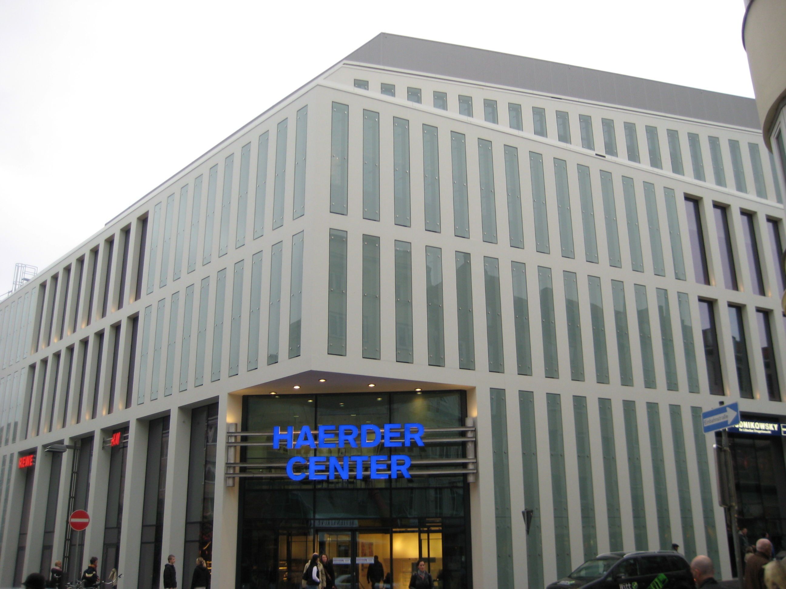 Haerder-Neubau in der Lübecker Wahmstraße, Ende Oktober 2008 eröffnet, aufgenommen an der Kreuzung Königstraße/Wahmstraße